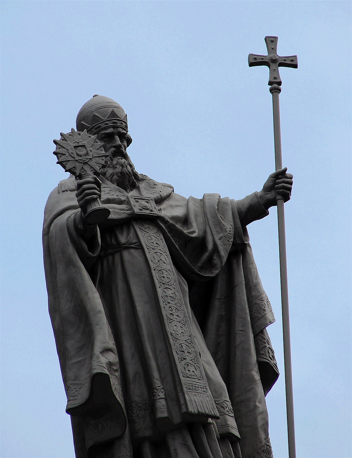 Gregor den Store, Christian Carl Peters, 1883-84, Frederikskirken, København